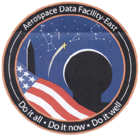 Aerospace Data Facility East logo